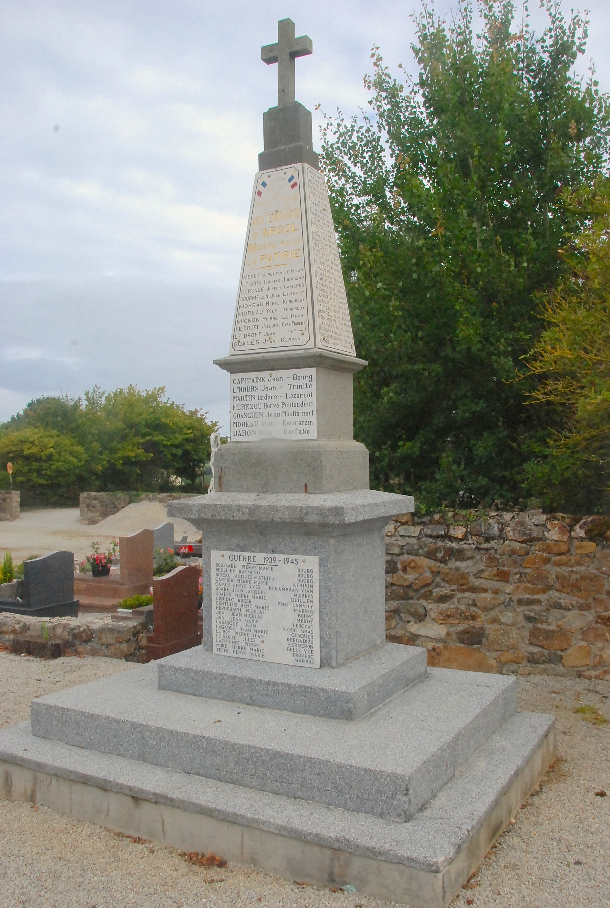 Monument aux morts - Argol-29